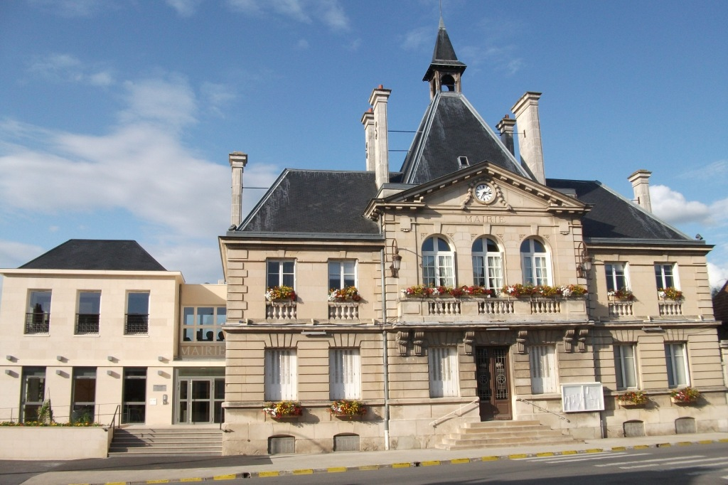 vue de la façade de l'hôtel de ville de Cormontreuil